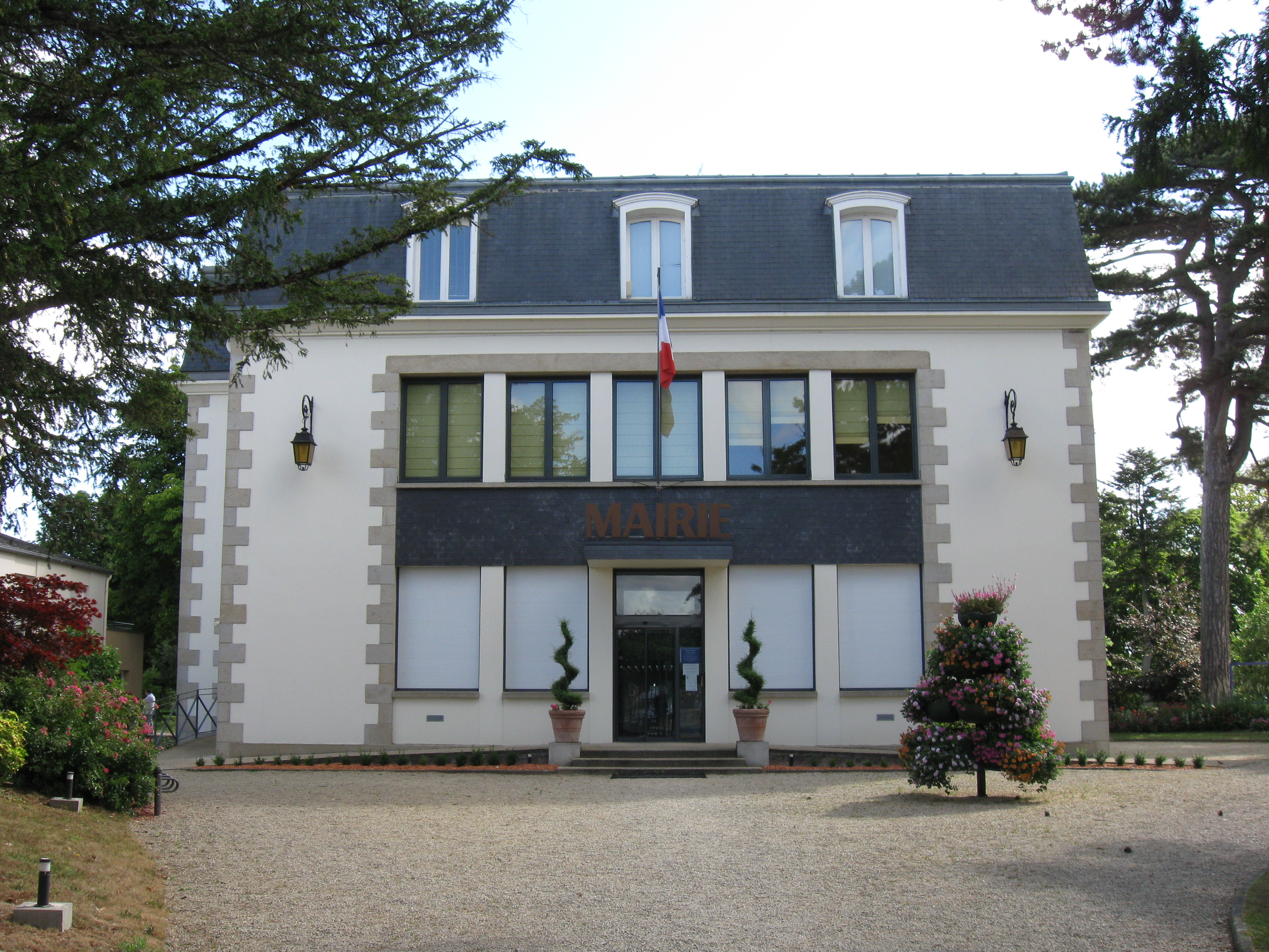 Mairie de Ploubalay. (Côtes-d'Armor, région Bretagne).